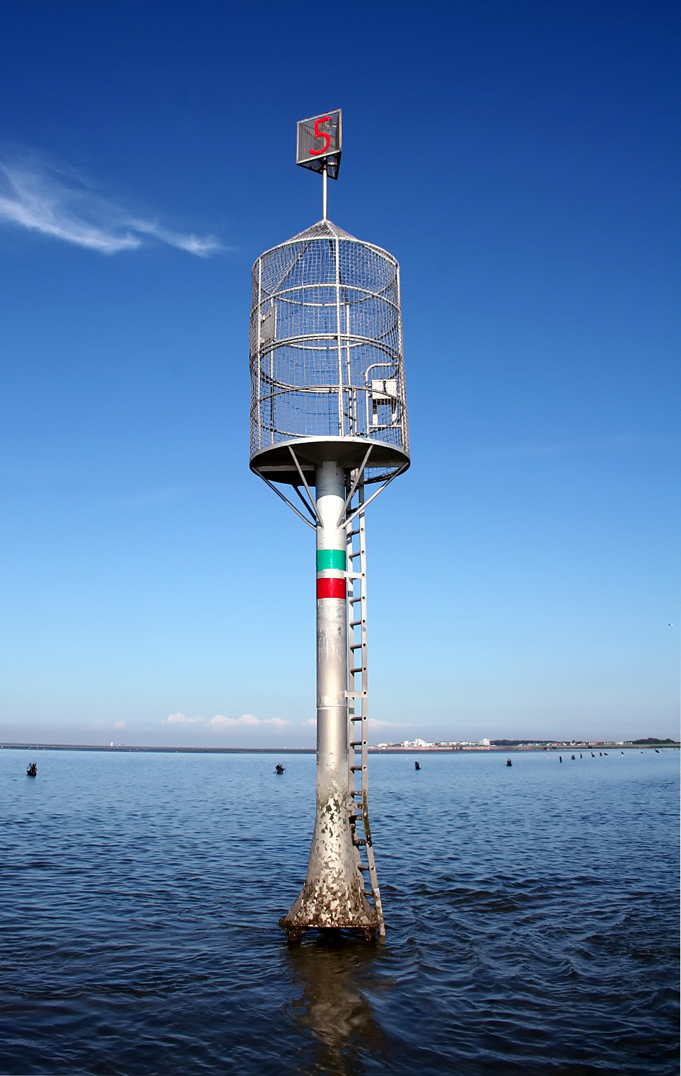 Rettungsbake, Wattwagenfahrt von Cuxhaven nach Neuwerk.